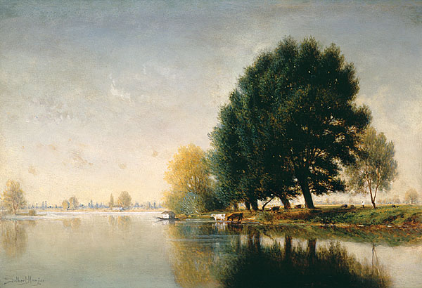 circa 1880-90.